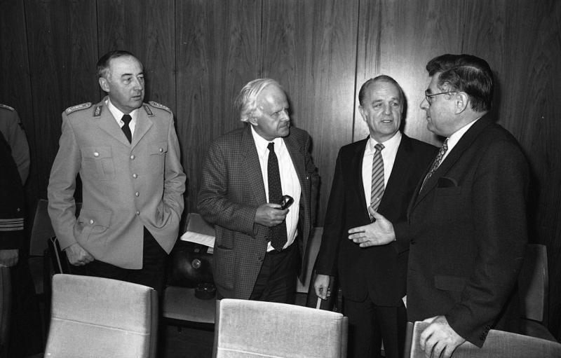 24.10.1983 Öffentliche Informationssitzung des Verteidigungsausschusses des Deutschen Bundestages im Bundeshaus zur NATO-Strategie.